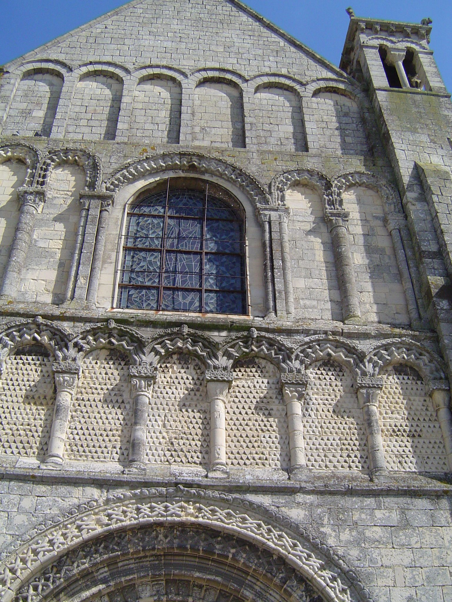 église de Ouistreham dans le Calvados en France. Cette église a été construite entre le XIIème et le XIIIème siècle